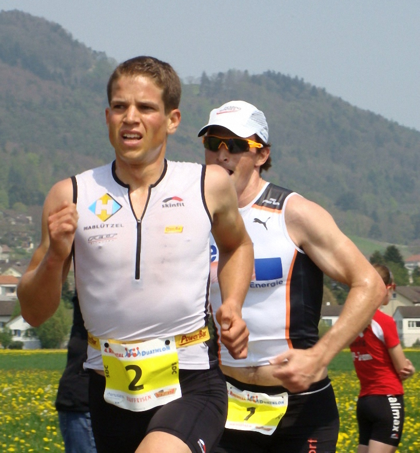 Andy Sutz beim Rheintal Duathlon 2010 – knapp gefolgt von Ronnie Schildknecht